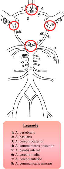 Circulus arteriosus, nachbearbeitet und Beschriftung modifiziert (Deutsch/german) von Patrick